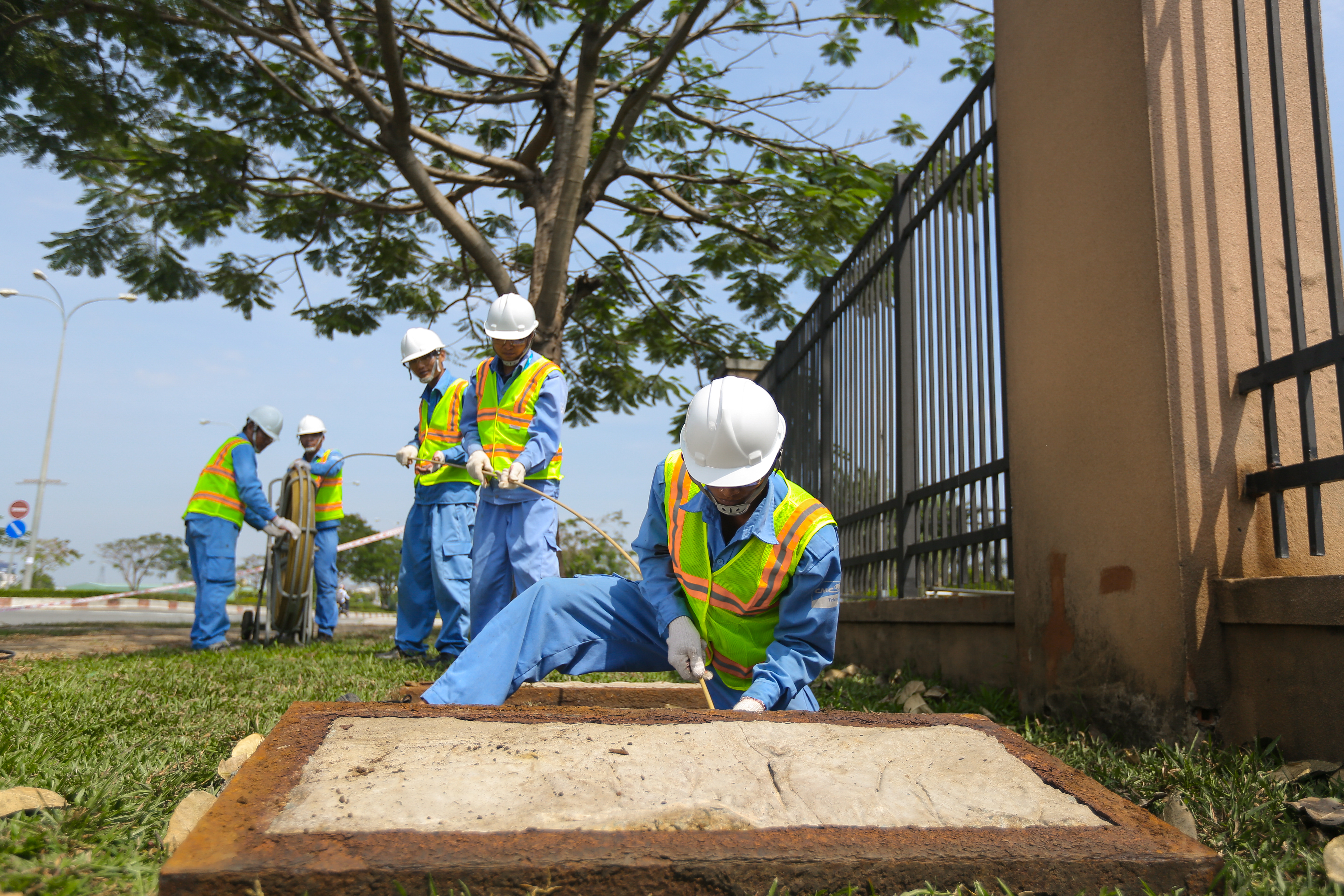 Hạ tầng cáp quang CMC Telecom